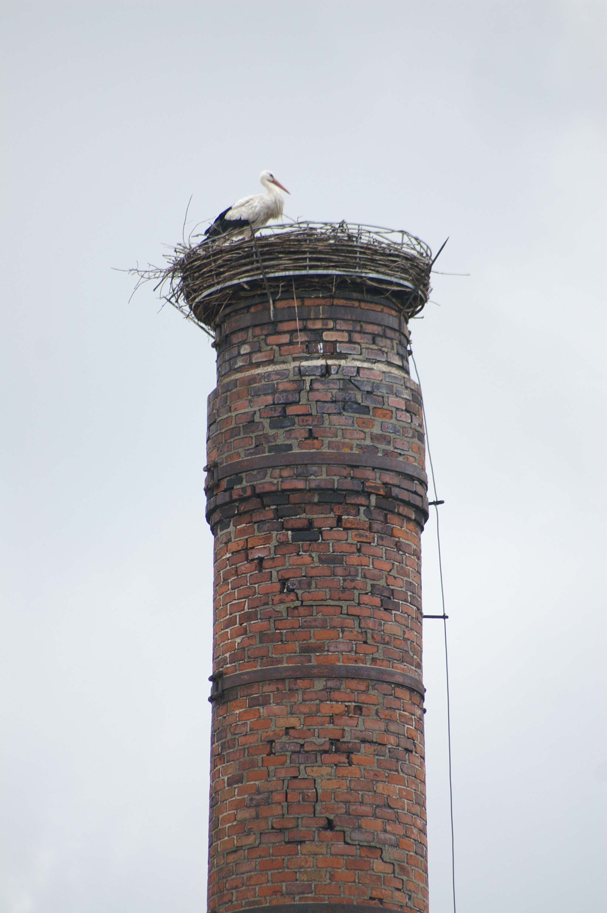 Die französische Störchin siedelt bereits zum dritten Mal mit einem unberingten Partner auf dem Kaminnest in Rottenacker im Alb-Donau-Kreis